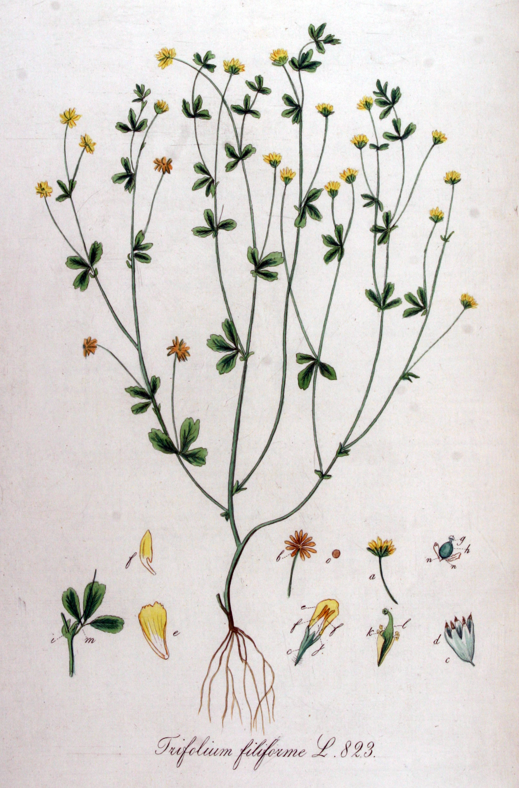 Trifolium dubium Sibth. (Syn.Trifolium filiforme L. nom. rejic.)